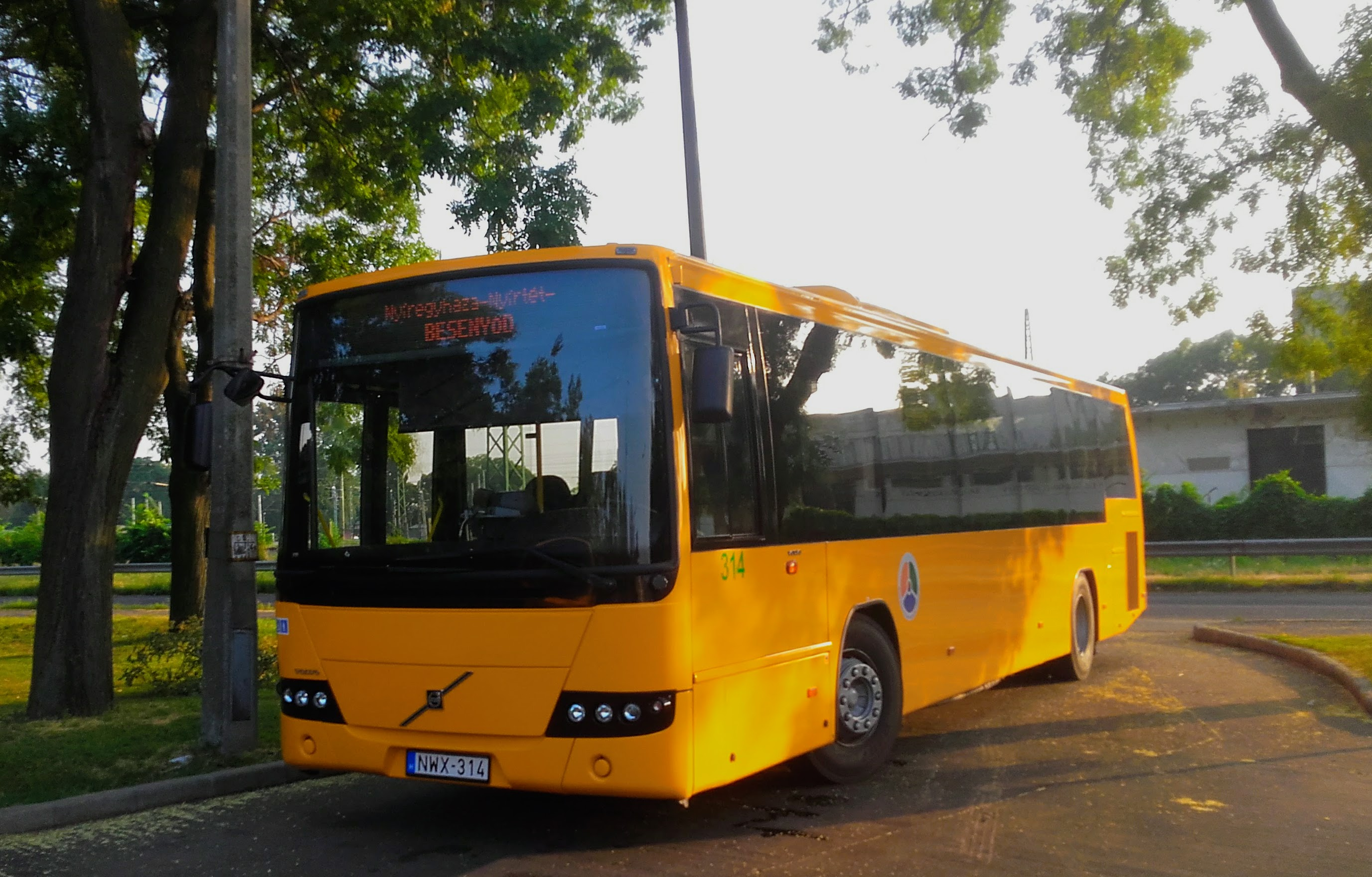 Az ÉMKK NWX-314 rendszámú Volvo 8700 típusú busza Nyíregyházán, az autóbusz-állomás közelében, a 4215-ös helyközi járaton.